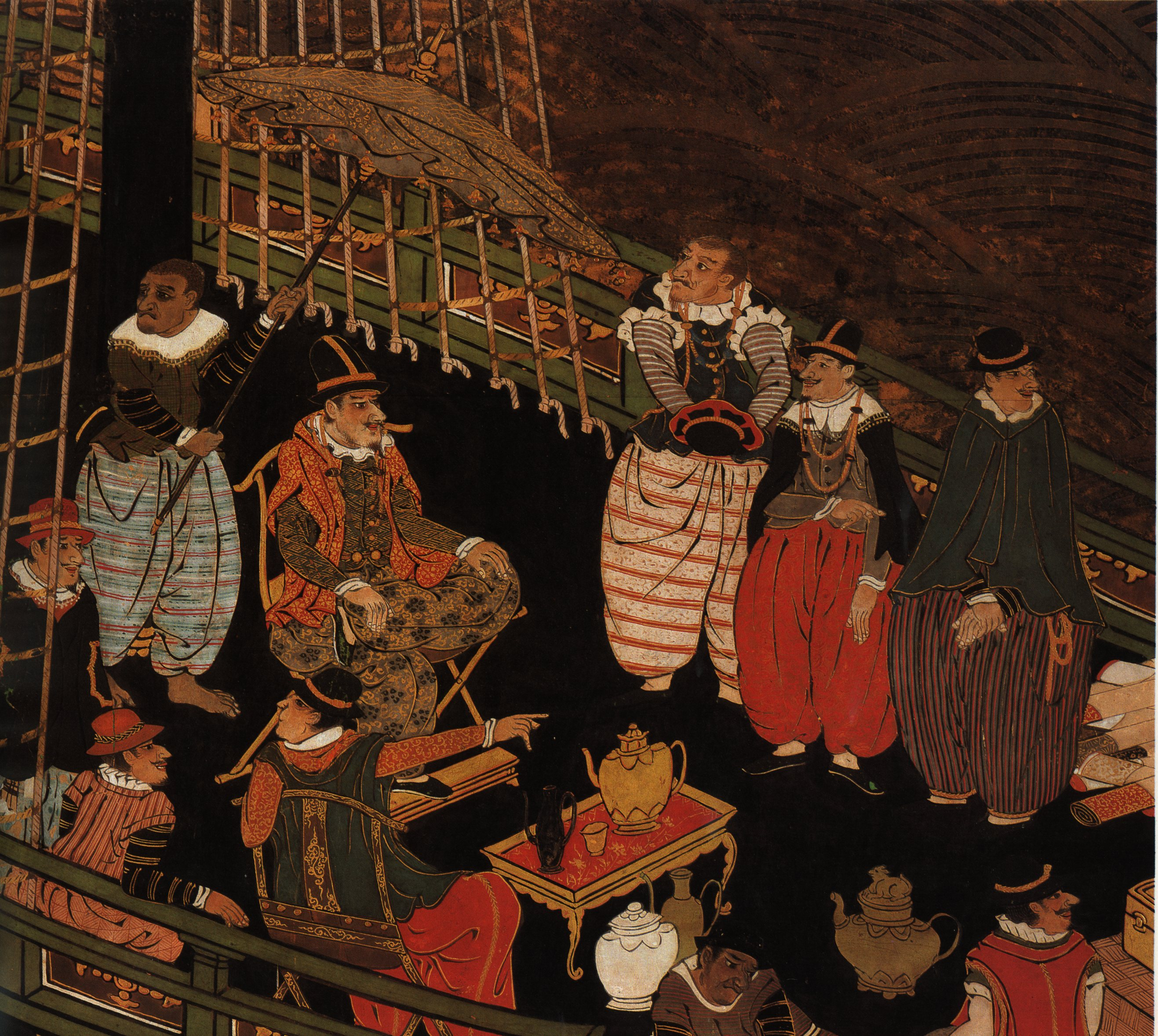 "Namban" art panels detail